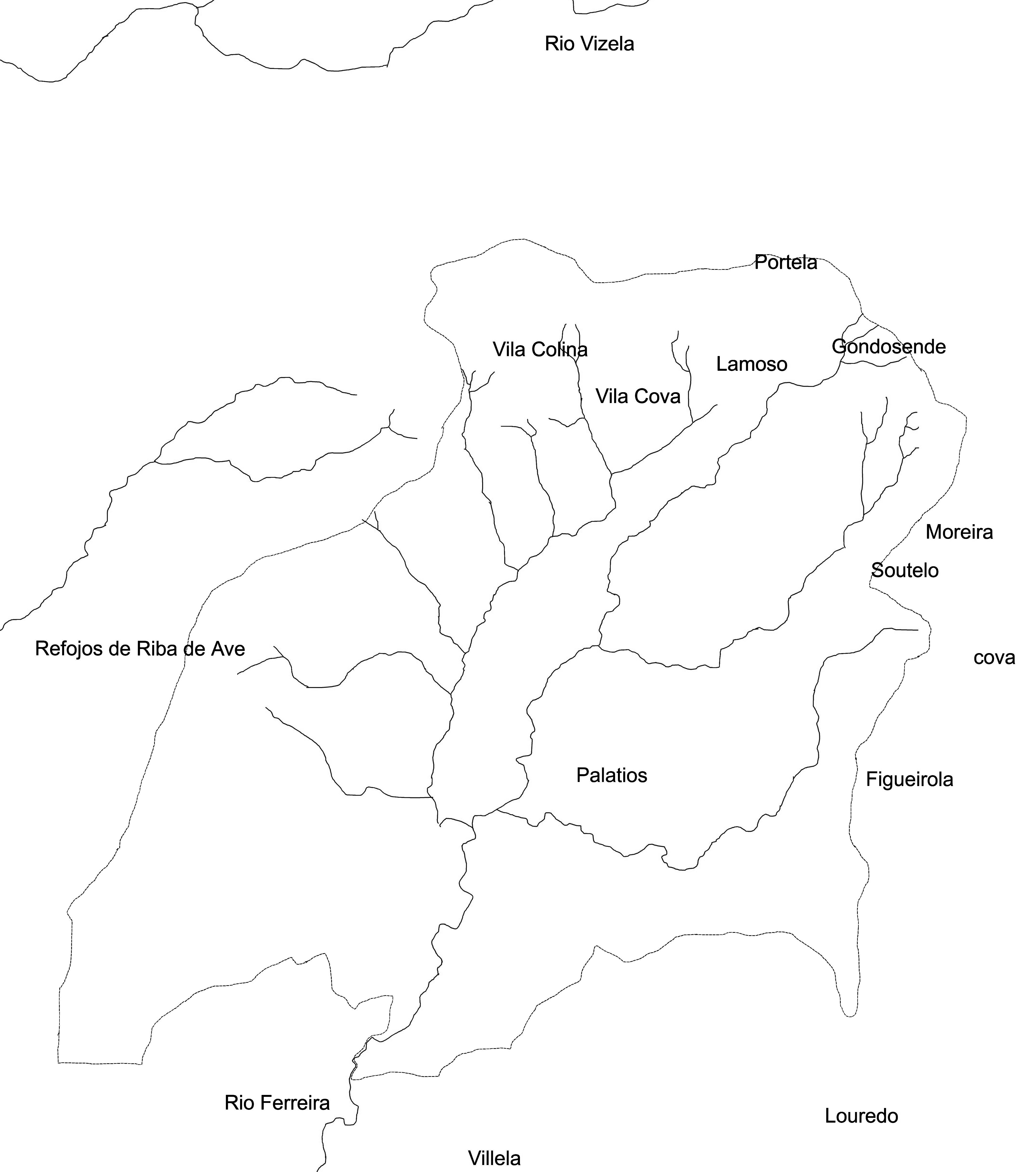 Terras referidas por Mumadona, na relação de bens doados, no século X.